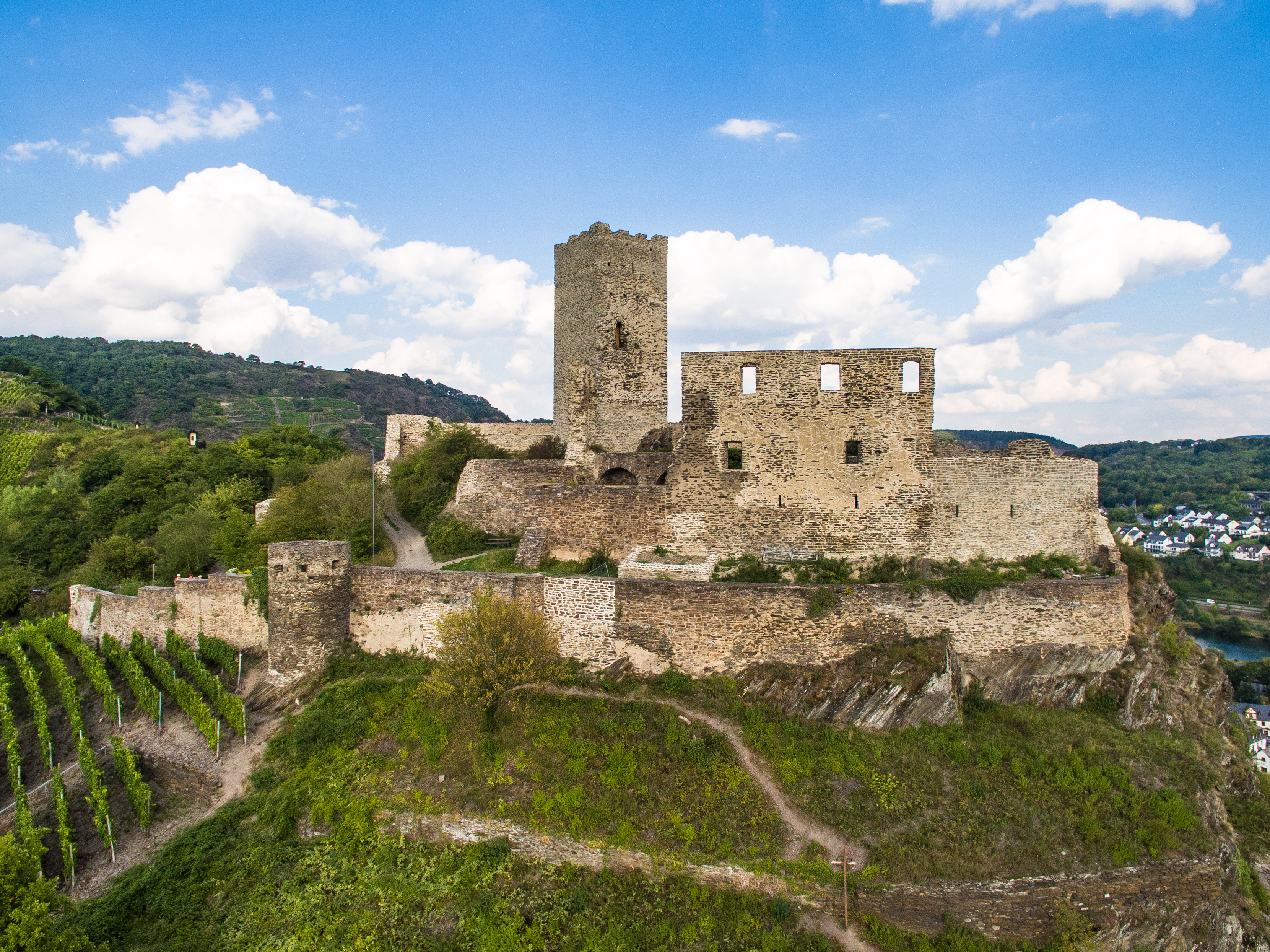 Luftbild der Niederburg in Kobern